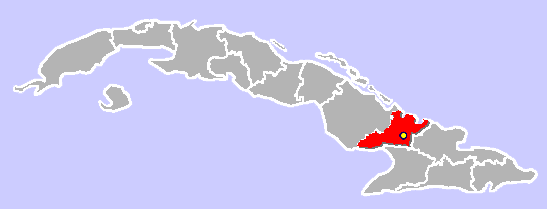 Location of Victoria de Las Tunas, Cuba